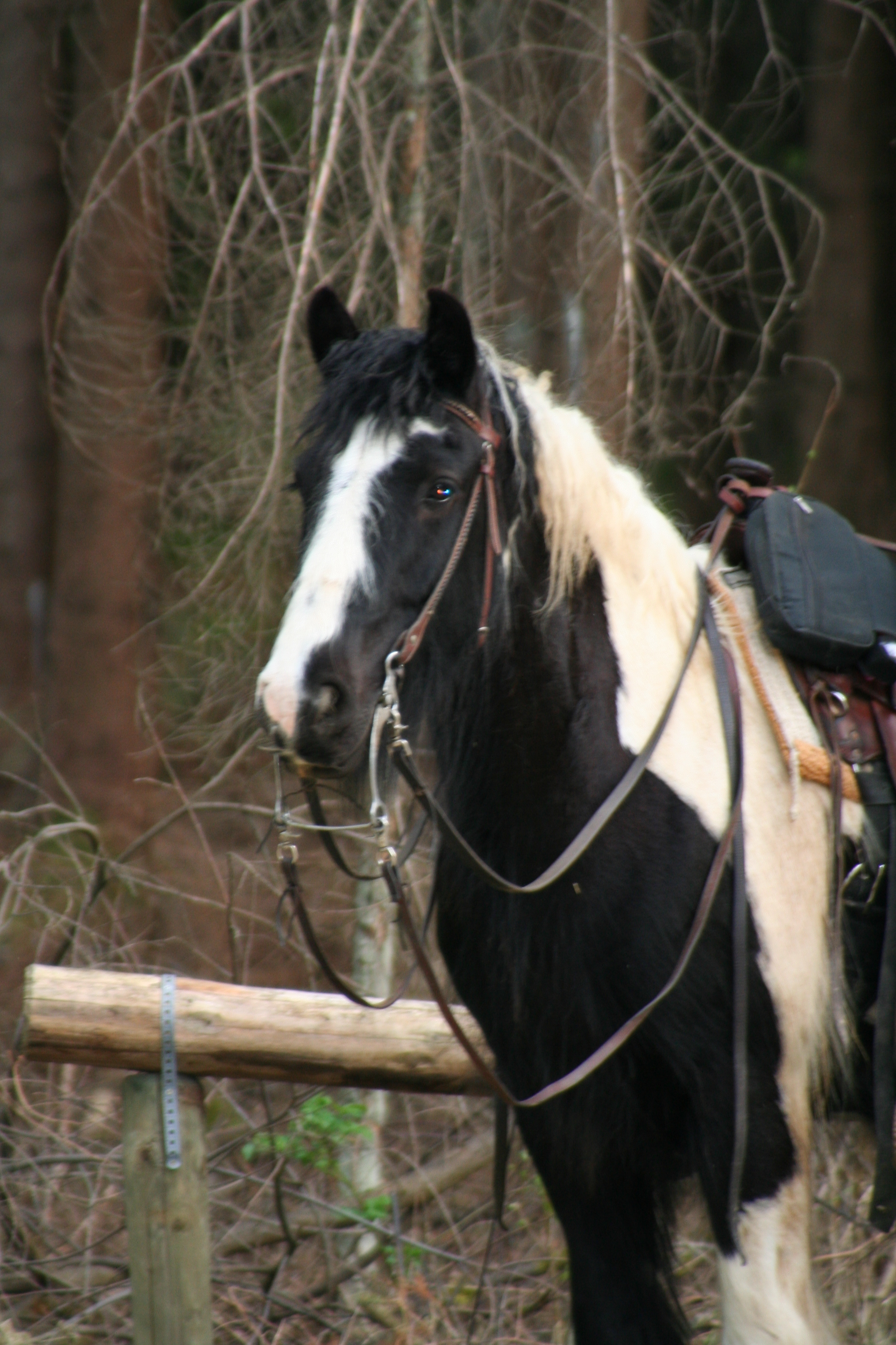 „Gauner“, Tinkerwallach, 9 Jahre alt. Deutschland.